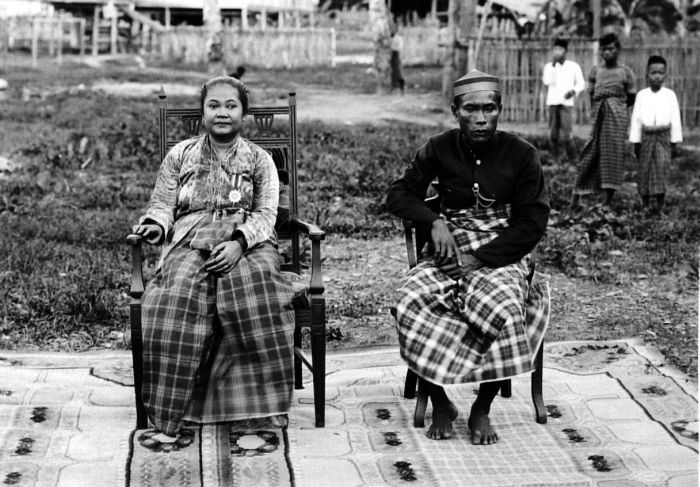 Negatief. De vorstin van Luwu, Wé Kambo Daëng Risompa, en haar tweede echtgenoot, La Batjo To Vapilé Opoe Patoenroe, eerste lid van de Andat van Luwu.